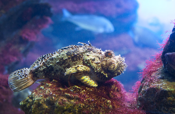 Черноморская скорпена-ёршLatina: Scorpaena porcus